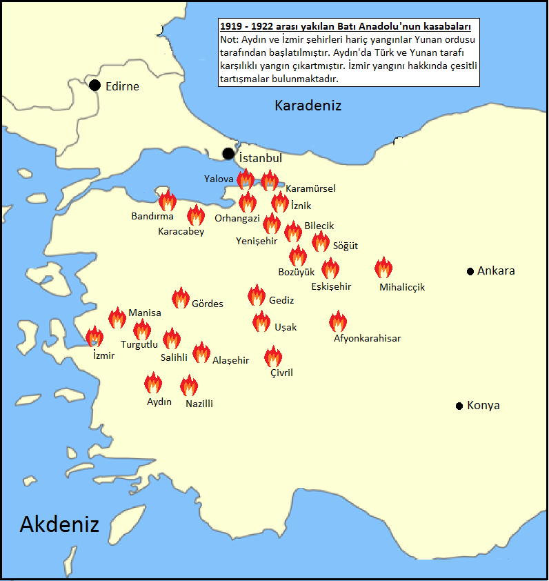 Batı Anadolu'da yakılan kasabalar. Lozan Konferansı esnasında Türk heyetinin listesi [1]